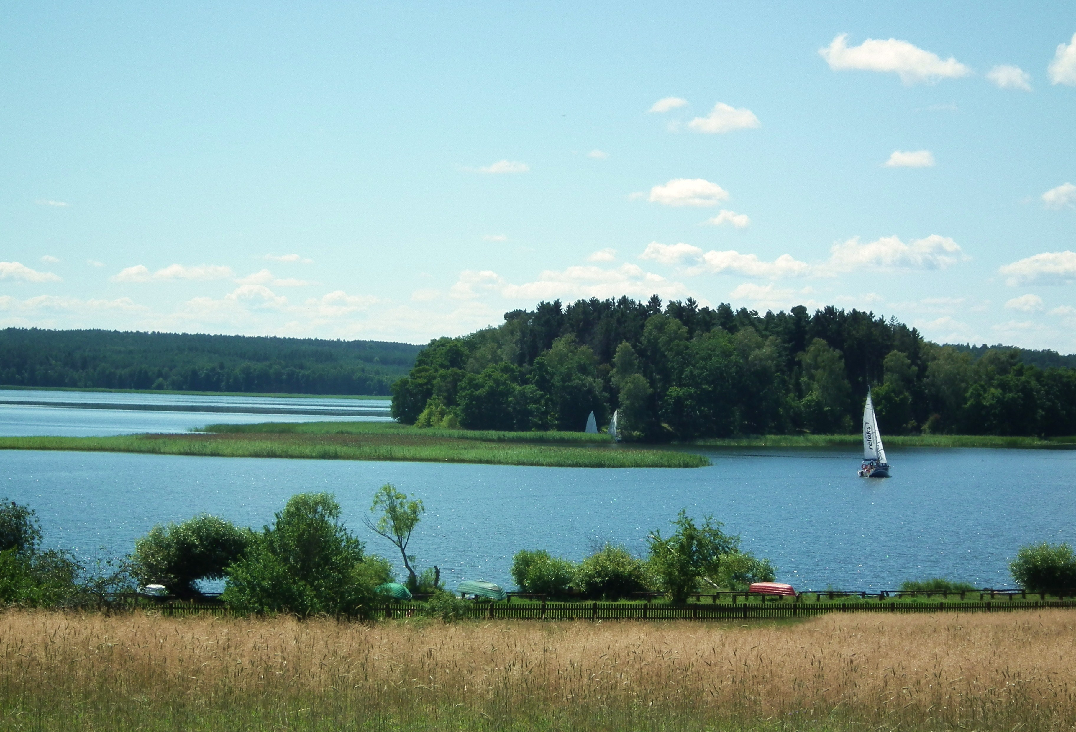 Jezioro Charzykowskie z Bachorza.